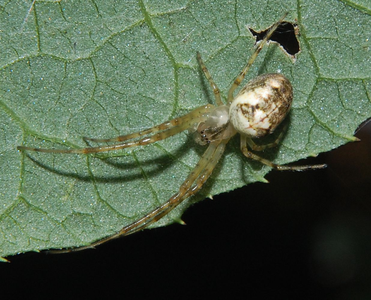 Metellina segmentata, male; det. K.-H. Kielhorn, Berlin